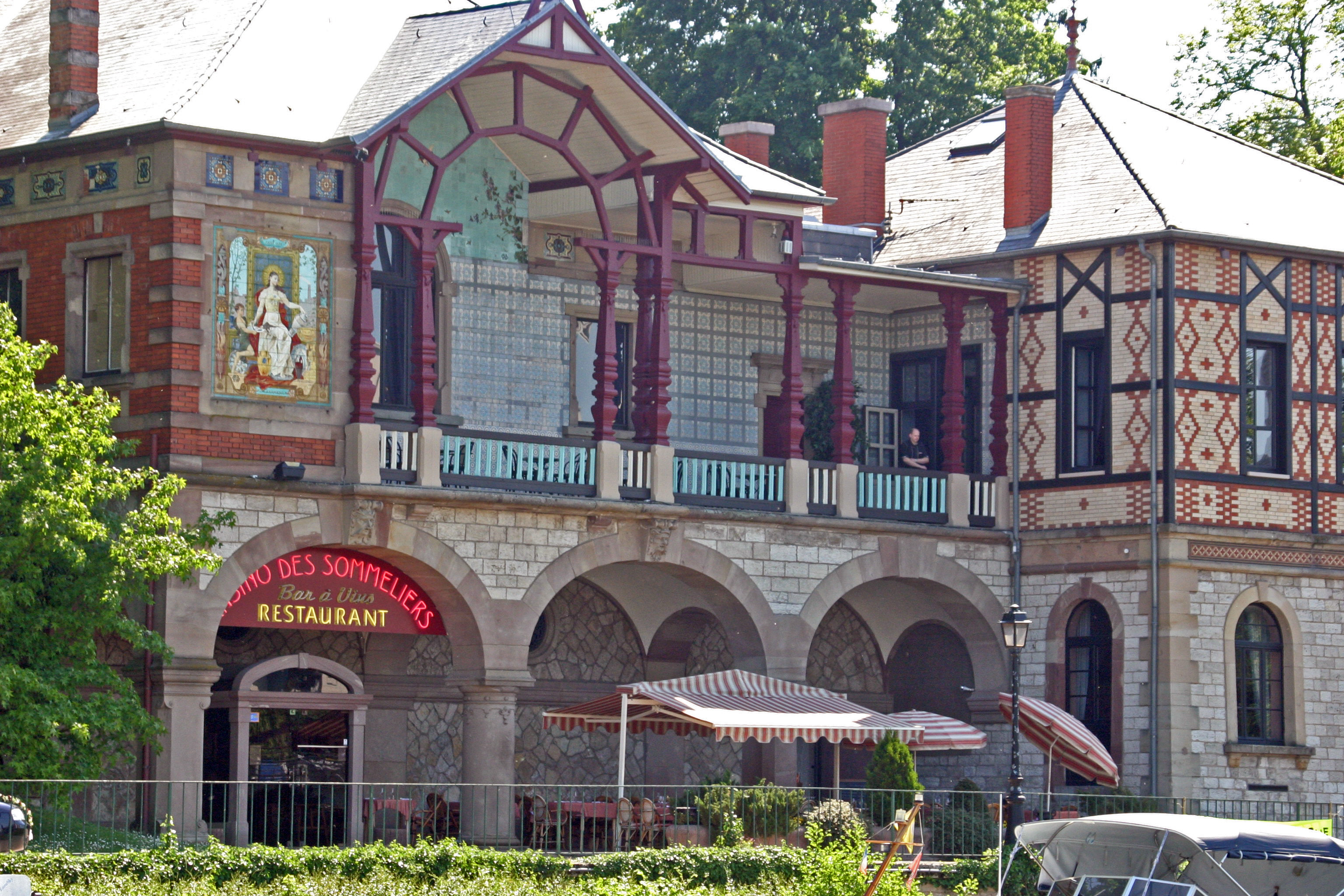 Sarreguemines, Casino de la Faïencerie